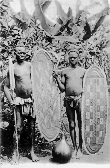 Types de guerriers Boudjas. Moyen Oubanghi. Boucliers, sagaie, coutcau de Jet. Congo francais. Mission Catholique Brazzaville.